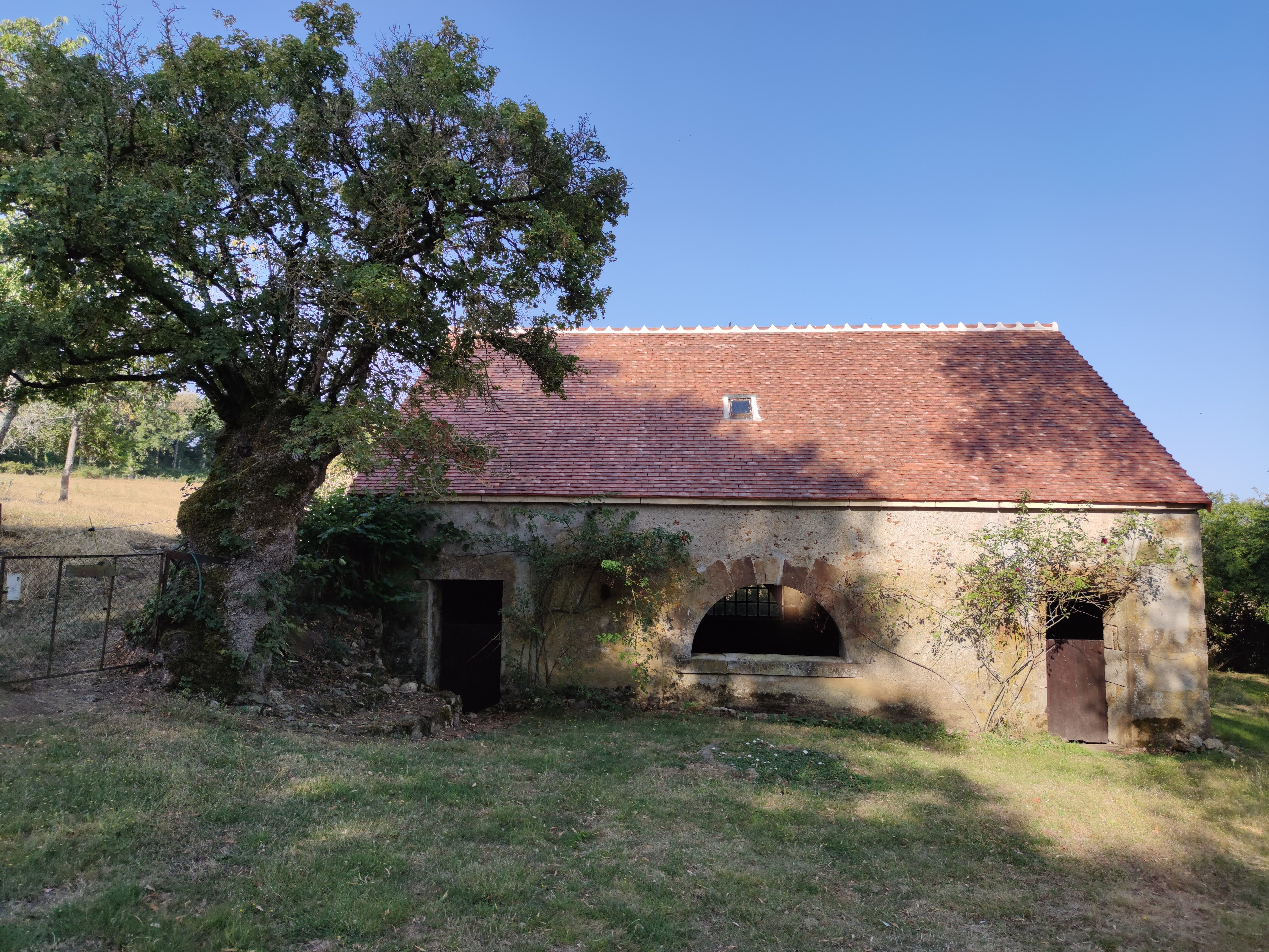 Lavoir de Parigny-la-Rose (Nièvre).